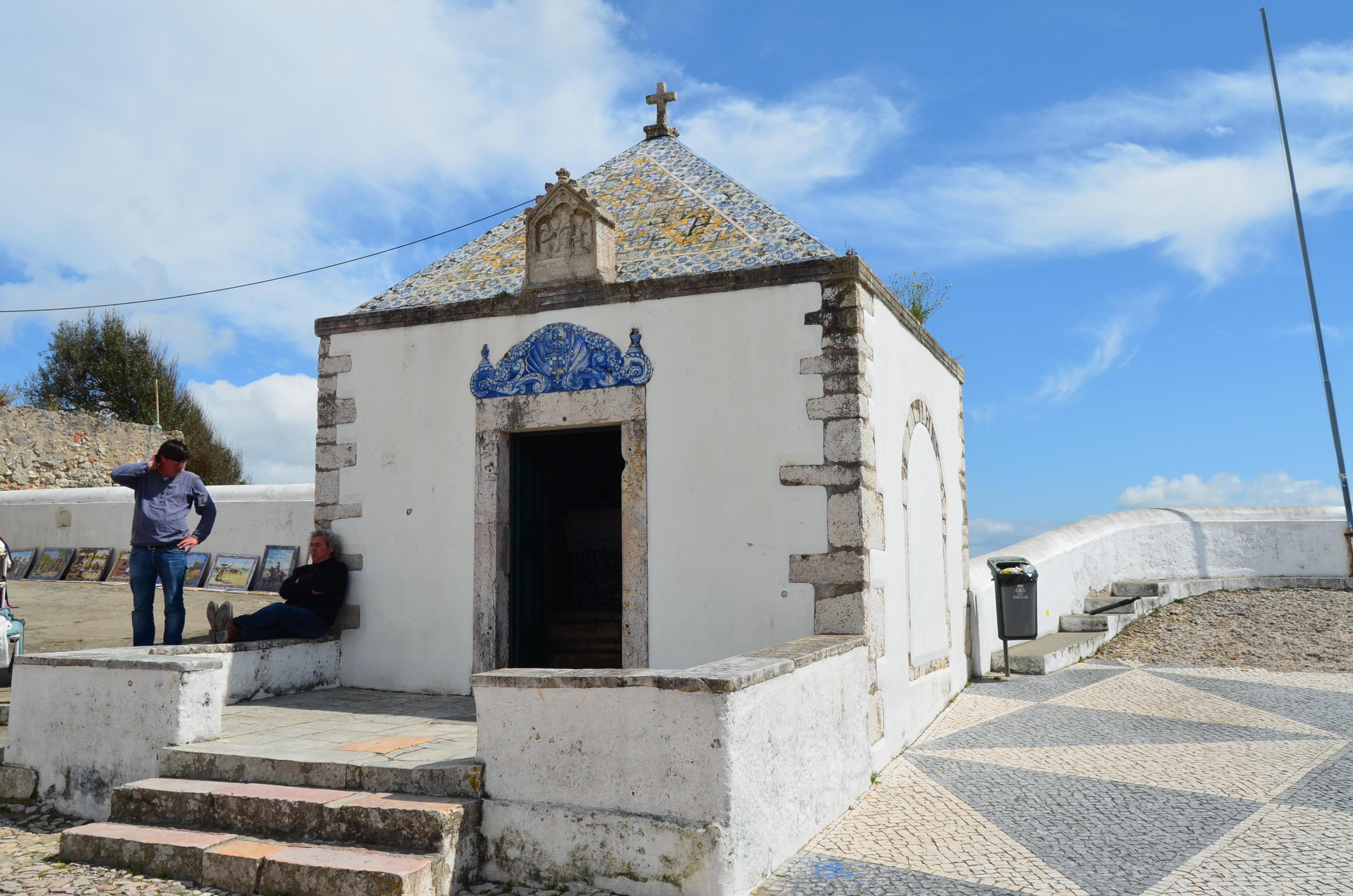 Nazaré - Portugal